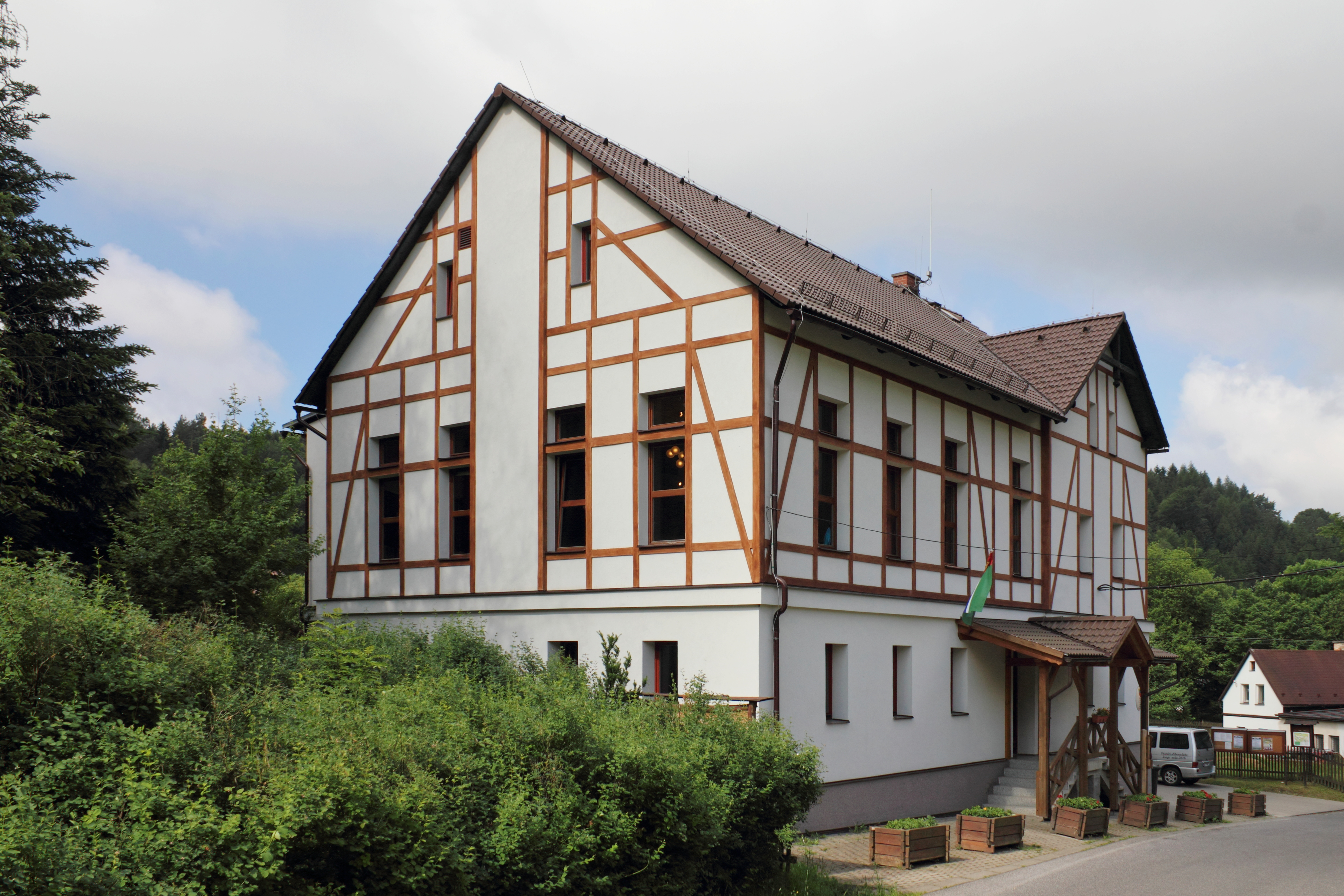 Obecní úřad Prysk